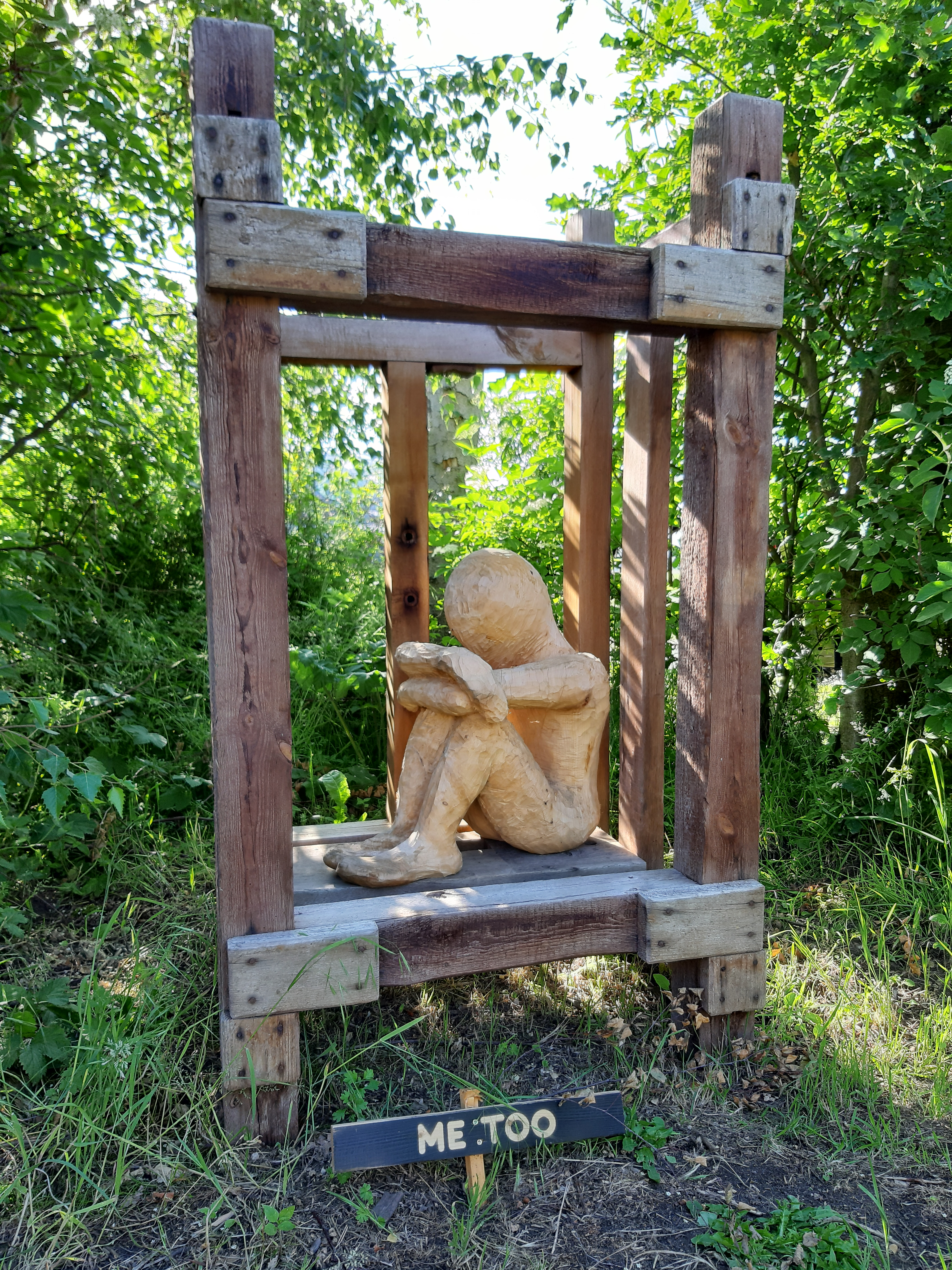 Skulptur zu #metoo, Landpartie 2019 im Wendland